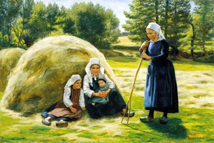 Haymaking Quimperle